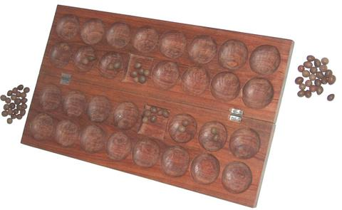 Tavoliere del Bao dalla Tanzania / Bao kutoka Tanzania / Bao Board from Tanzania